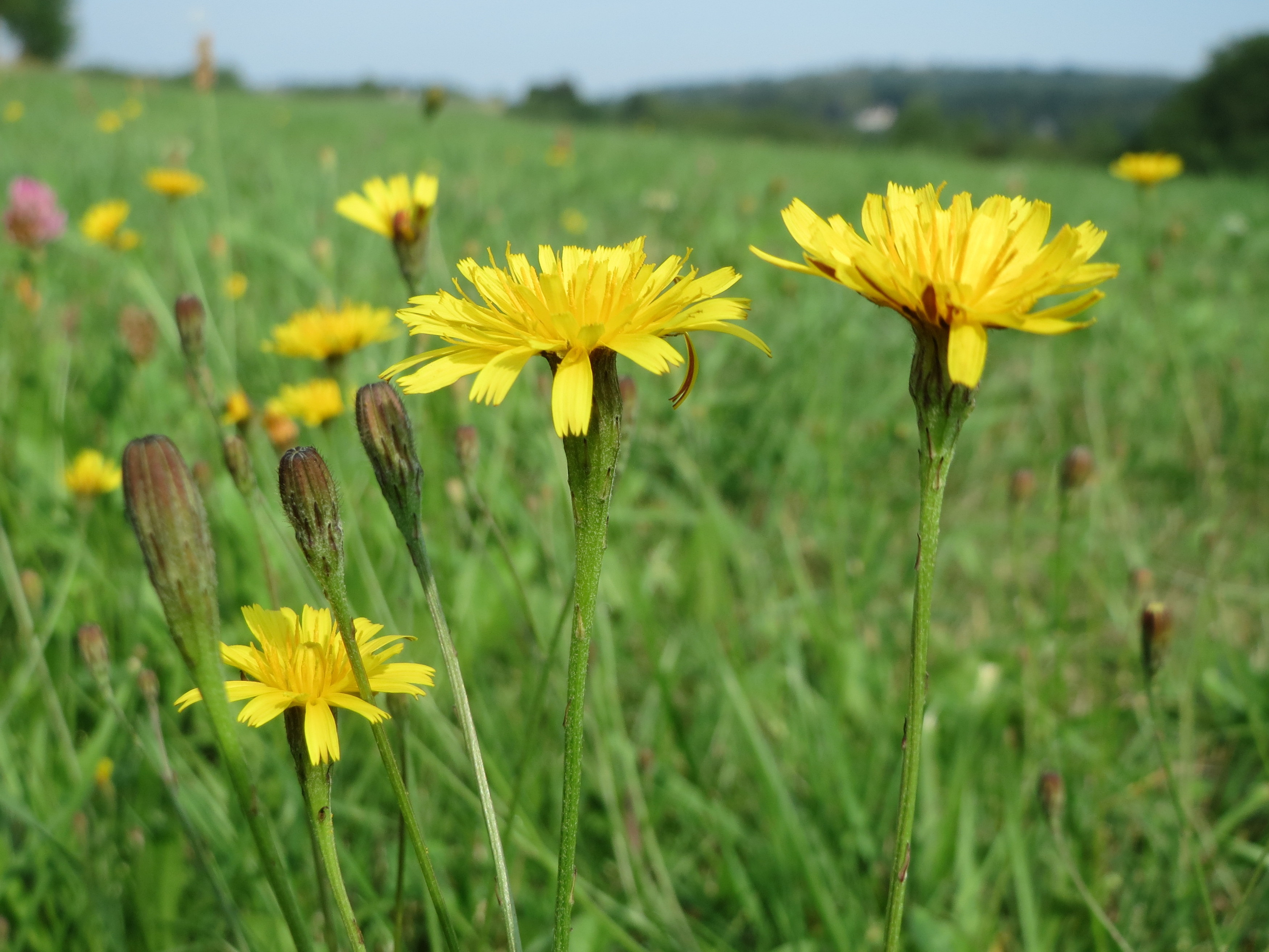 Herbst-Löwenzahn (Scorzoneroides autumnalis) bei Schalkenmehren